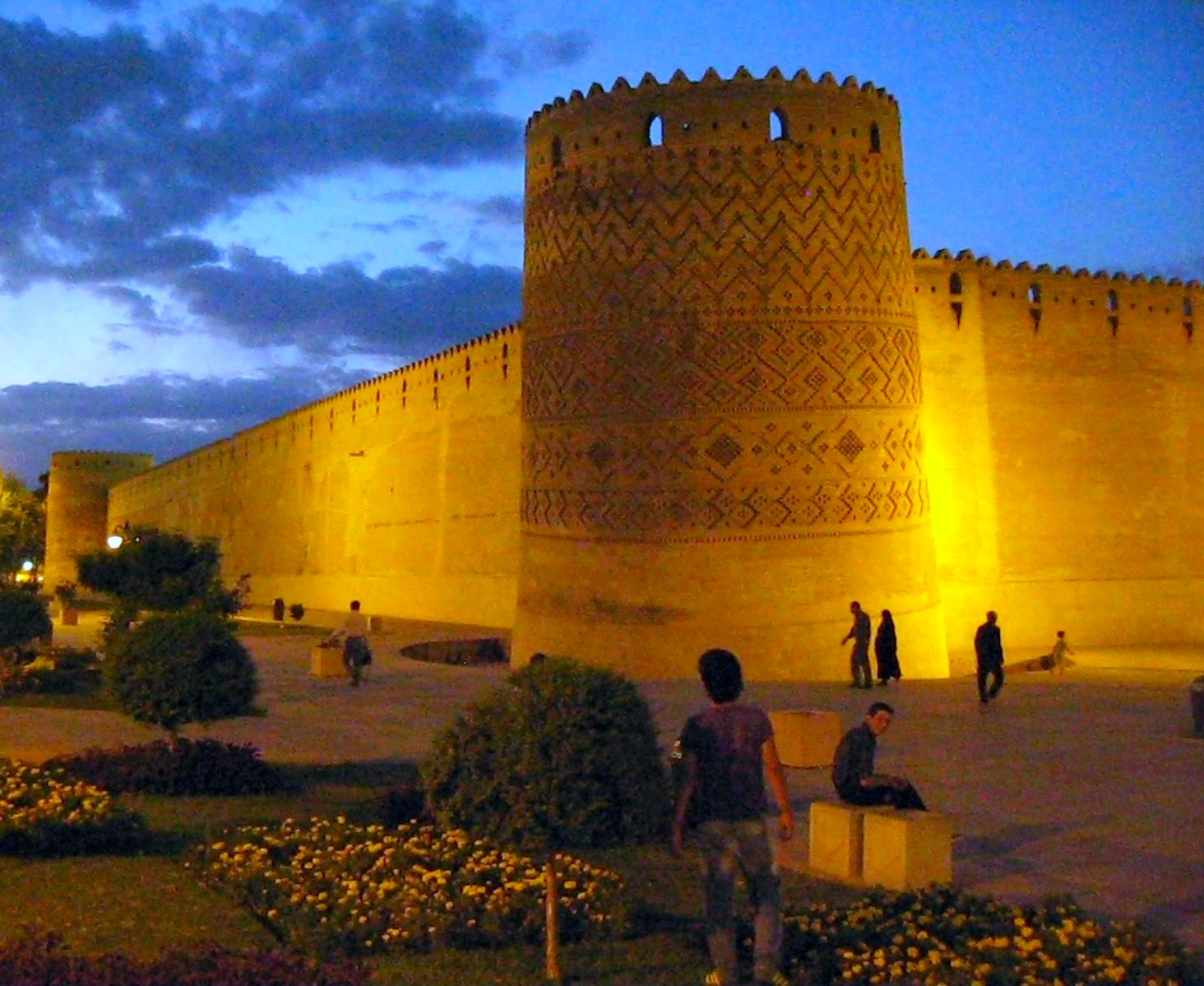 Arg-e Karim Khani, Shiraz, Iran